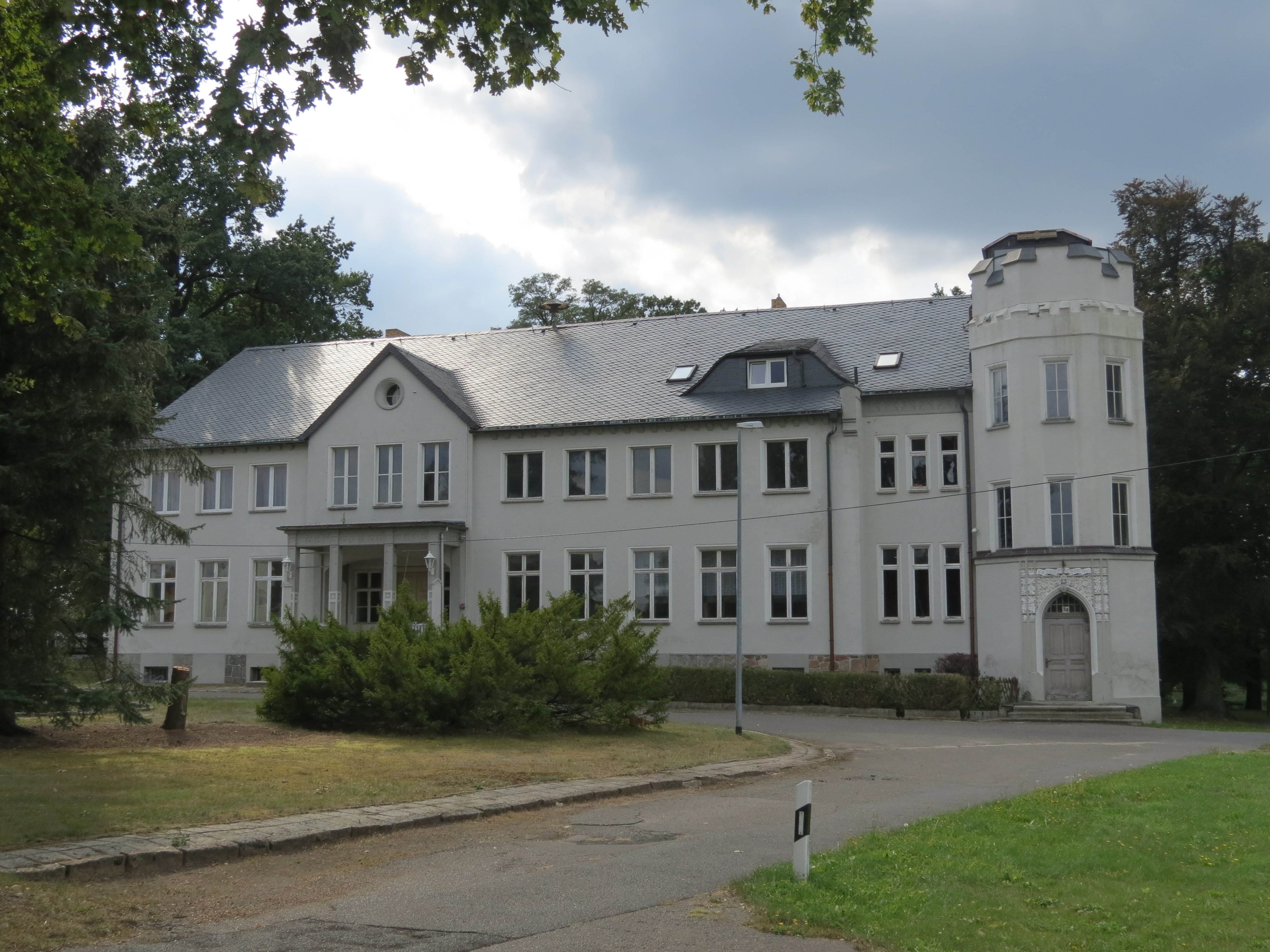 Gutshaus Klein Loitz, Frontseite, Klein Loitz, Gemeinde Felixsee, Landkreis Spree-Neiße, Brandenburg